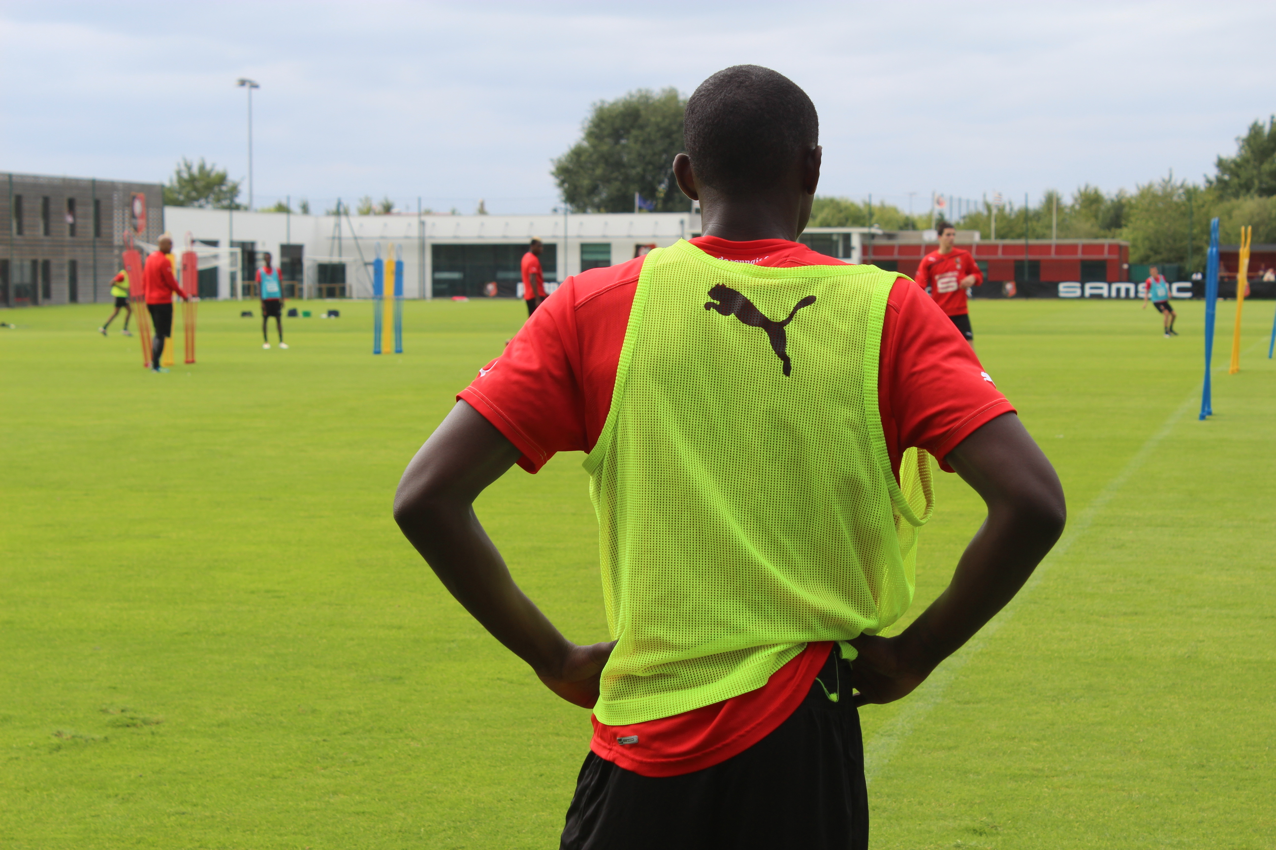 Chris Mavinga attendant qu'on lui donne le départ pour lancer une phase de jeu lors de l'entrainement du Stade Rennais.